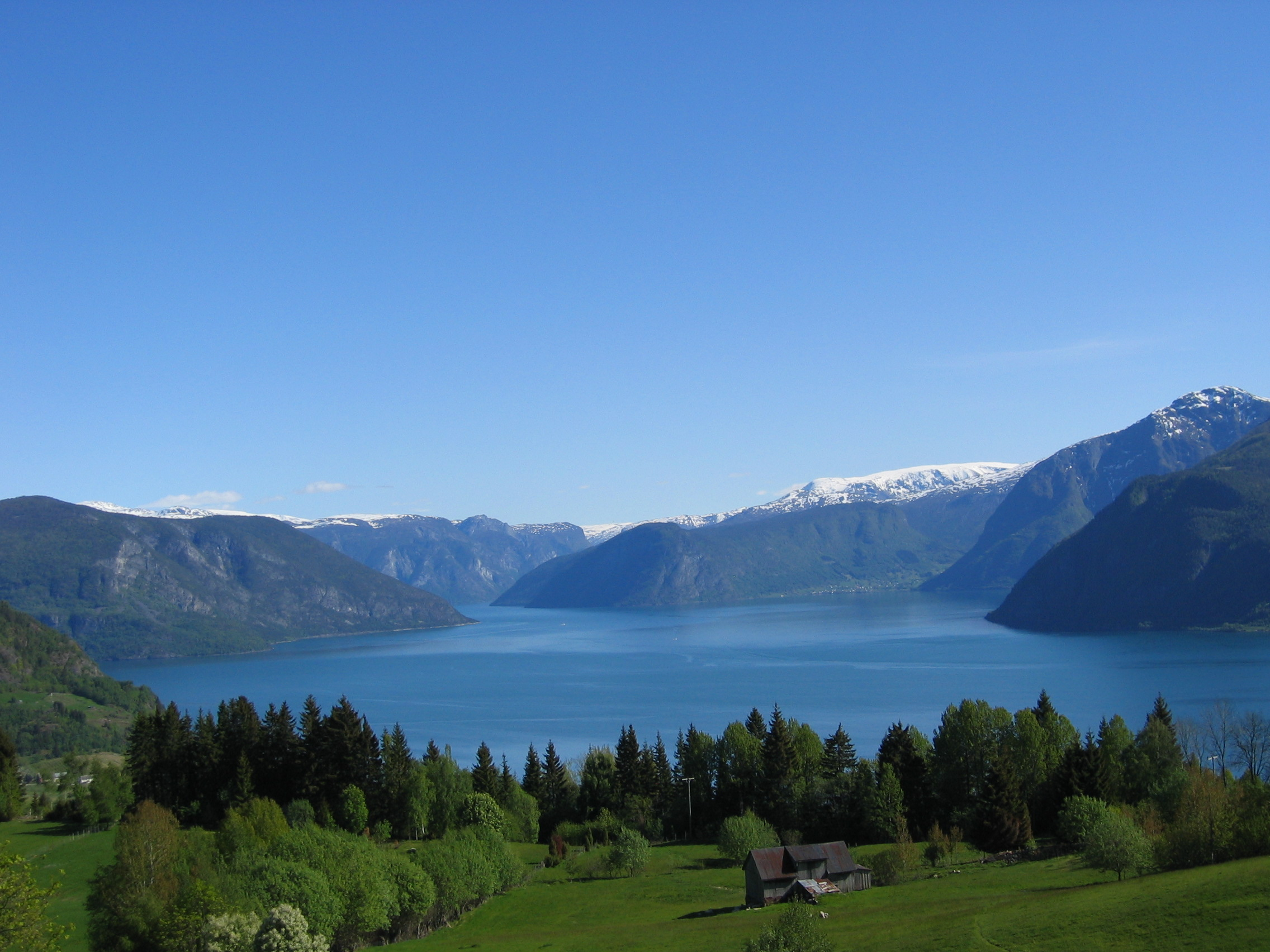 Utsyn over Sognefjorden frå Leikanger